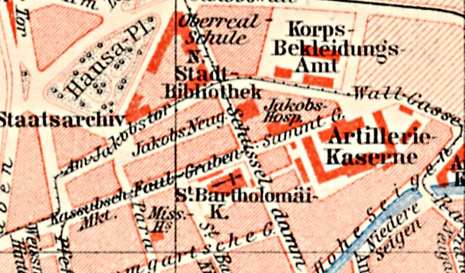 Umgebung der OberRealschule zu St.Petri (heute: Nikolaus-Kopernikus-Lyzeum) in Danzig. Ausschnitt aus dem Plan von Danzig in Meyers Konversations-Lexikon, 6. Ausgabe von 1905. Mittig liegt die Bartholomäuskirche